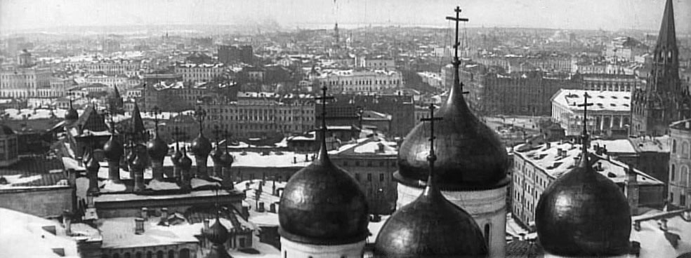 Обзор западной стороны с высоты звонницы. На переднем плане: Купола Успенского собора Московского кремля На заднем плане: cлева дом Пашкова; по центру -- колокольня Крестовоздвиженской церкви (ул.Воздвиженка); справа Троицкая башня, за ней виден Манеж и Моховая улица.